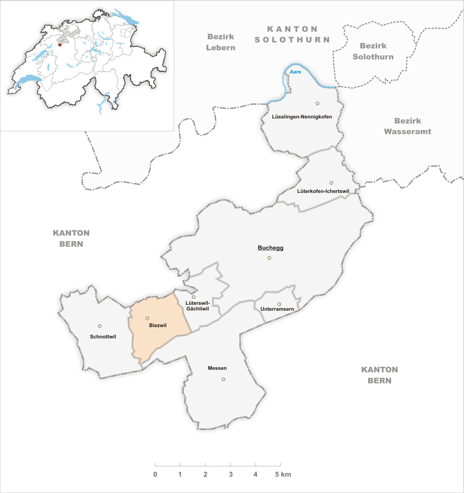 Municipality Biezwil